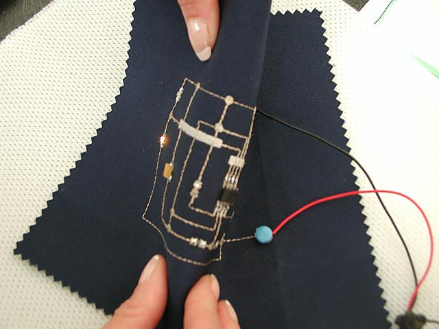 Gestickte Leiterplatte mit galvanisiertem Faden